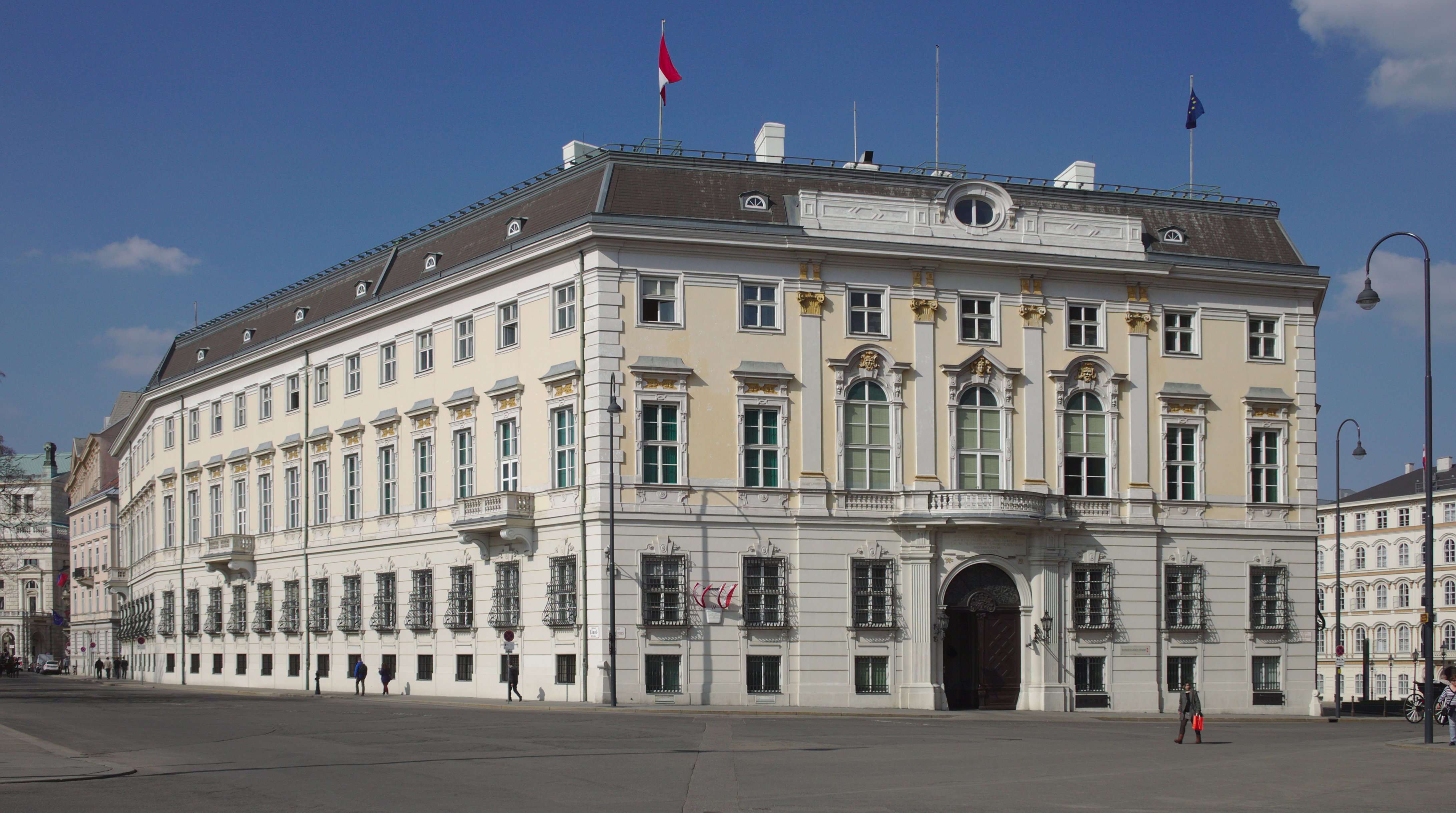 Bundeskanzleramt und Österr. Haus-, Hof- und Staatsarchiv